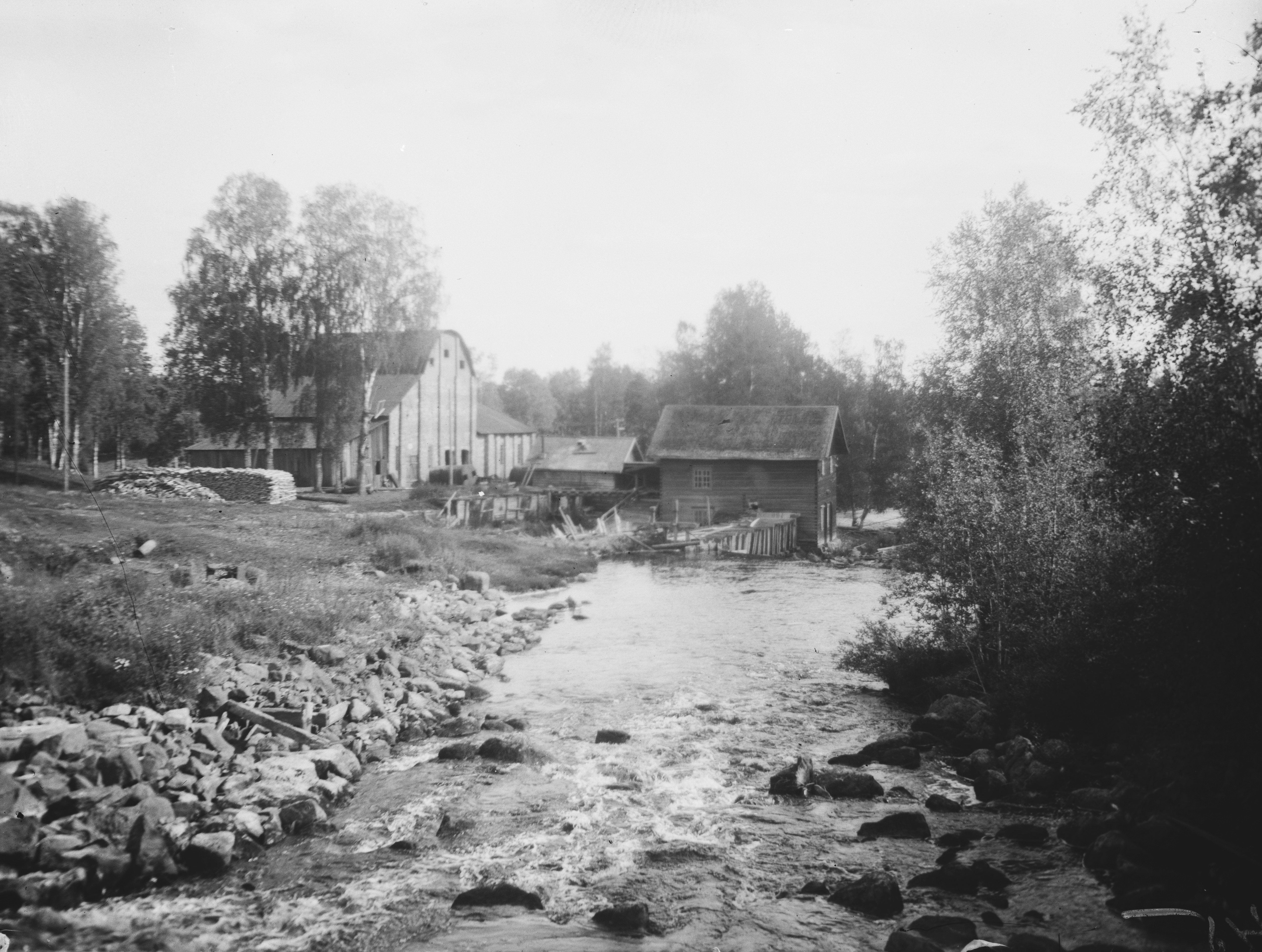 Salahmin ruukki ja mylly Vieremällä; sillalta katsottuna.